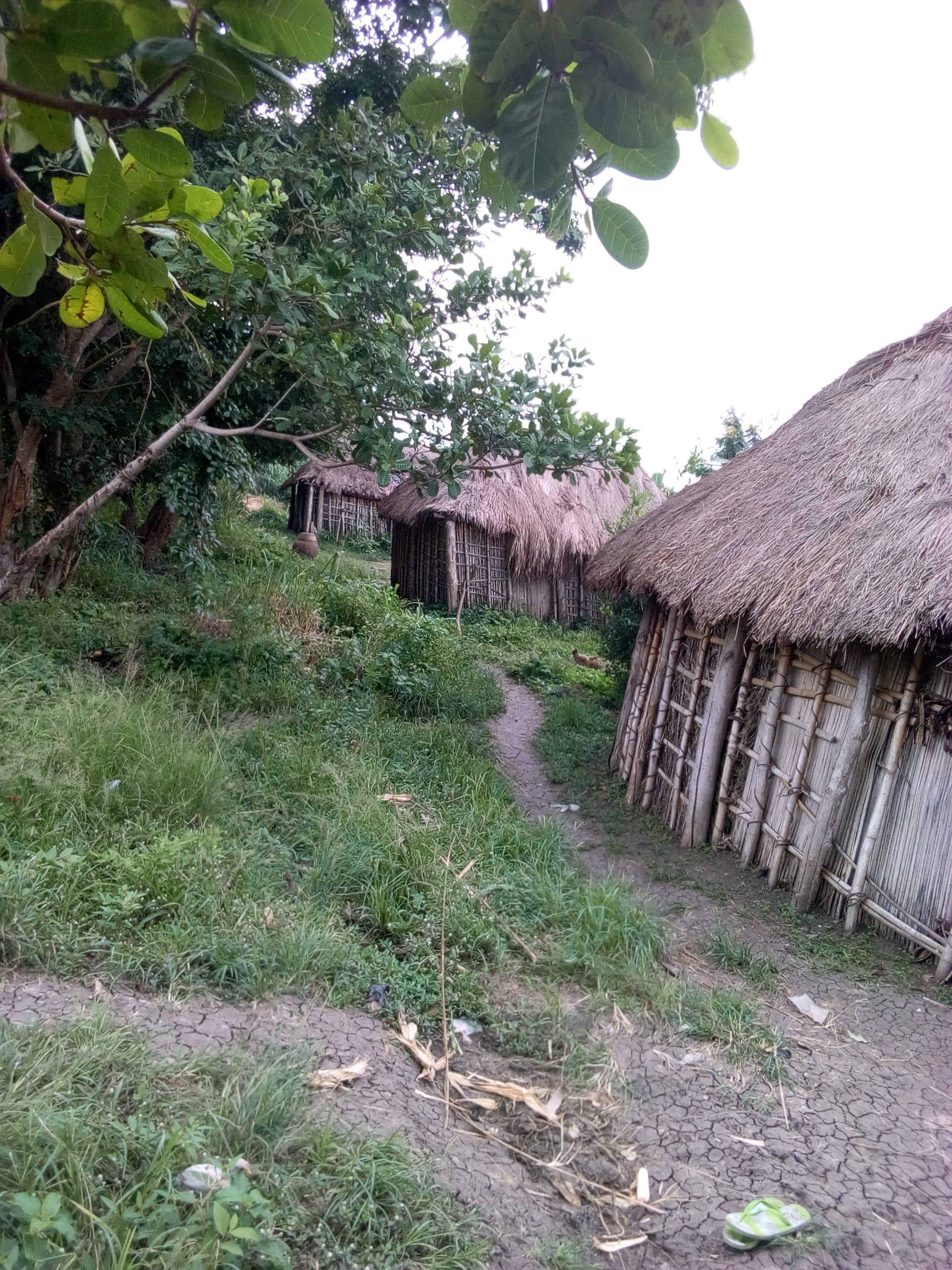 mon beau village à Igana